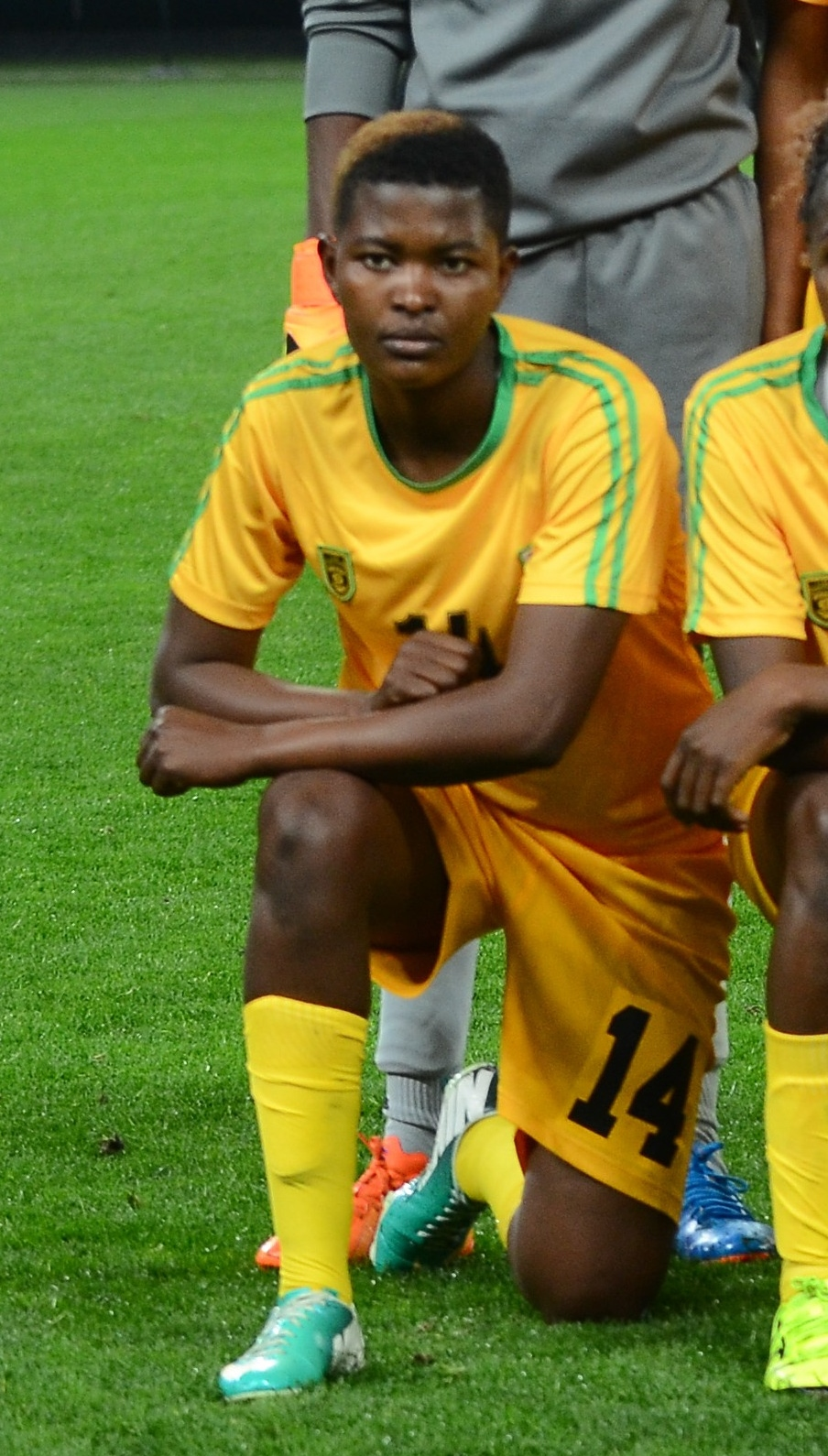 São Paulo - Seleções femininas do Zimbábue e da Alemanha se enfrentam na Arena Corinthians (Rovena Rosa/Agência Brasil)